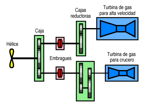 Esquema de un sistema de propulsión COGOG Same as Image:COGOG-diagram.png with Spanish legend. Modified version of a public domain drawing made by Alureiter. Modifications also released into public domain. Idéntica a Image:COGOG-diagram.png con leyendas en español. Versión modificada de un dibujo hecho por Alureiter y puesto por él en el dominio público. Las modificaciones son también colocadas en el dominio público.